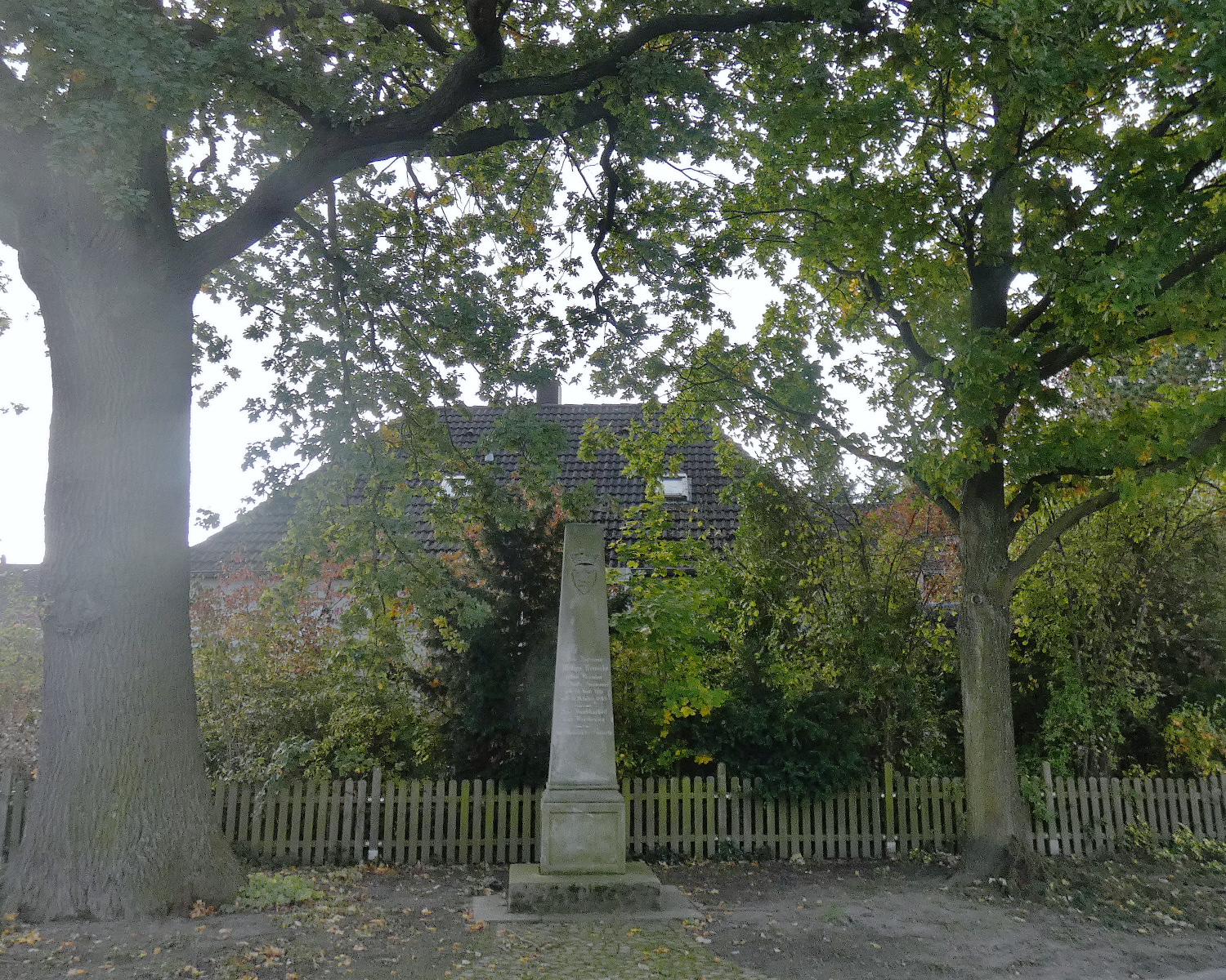 Das 1850 bei Linderte aufgestellte Amtmann-Reinecke-Denkmal ist ein Obelisk aus Wealdensandstein. Er ist eingerahmt von zwei im gleichen Jahr gepflanzten Stiel-Eichen.